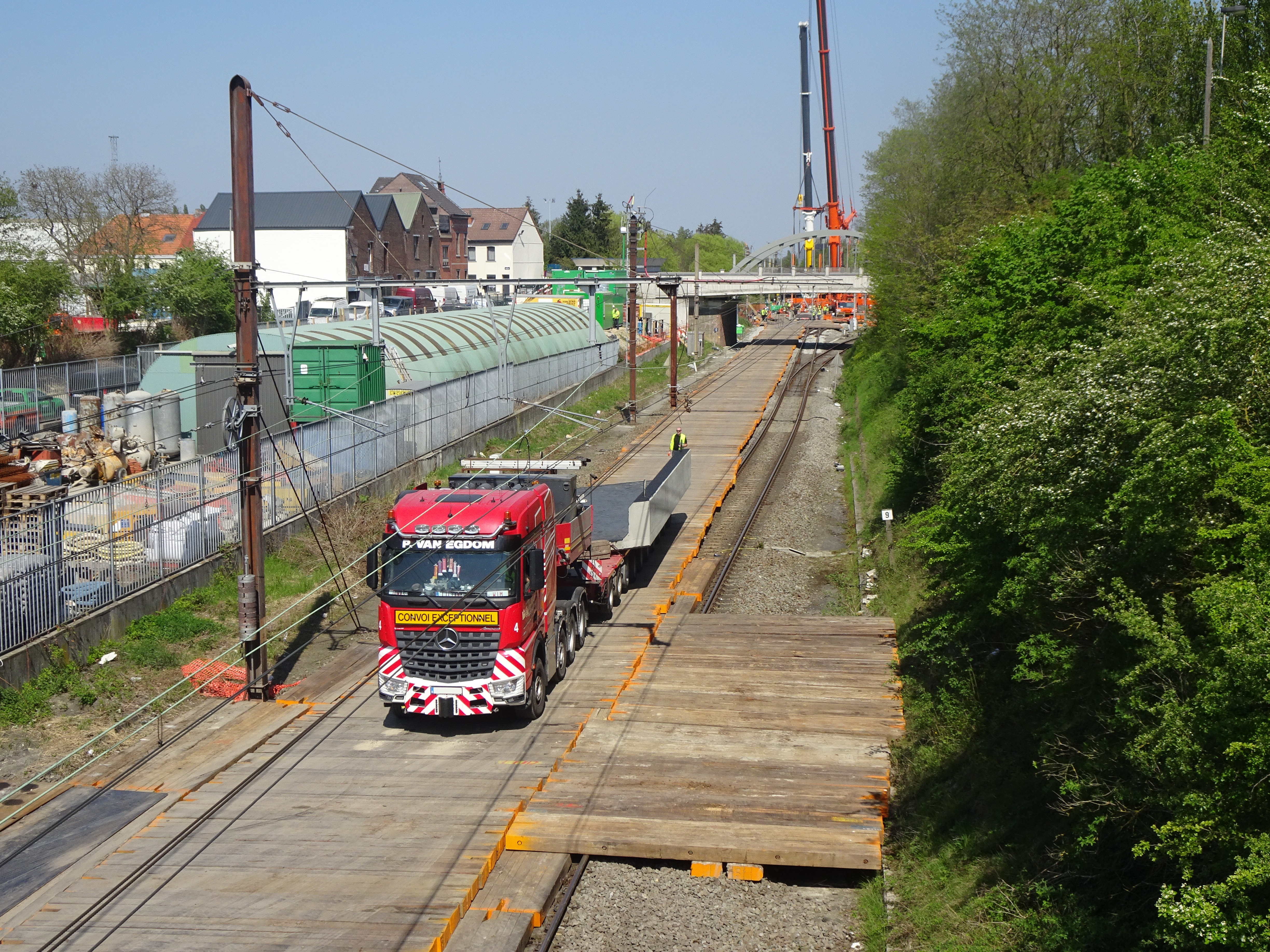 Le nouveau pont de Haren est acheminé par camion.